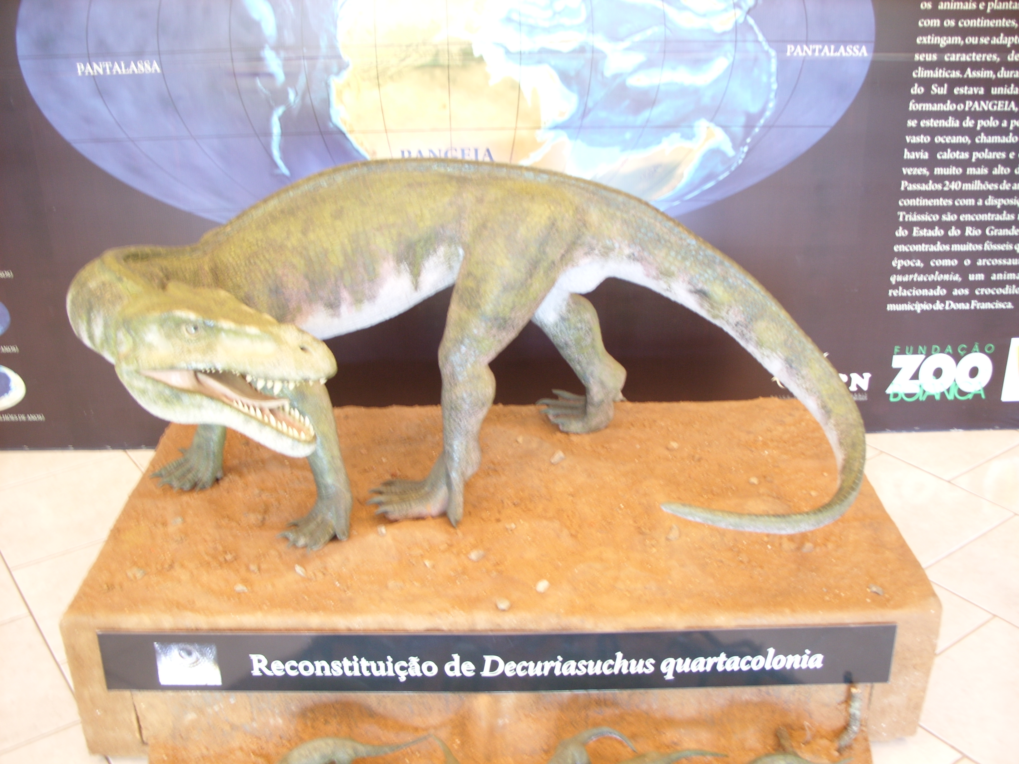 Decuriasuchus no Museu de Ciências Naturais da Fundação Zoobotânica do Rio Grande do Sul (Paleorro)